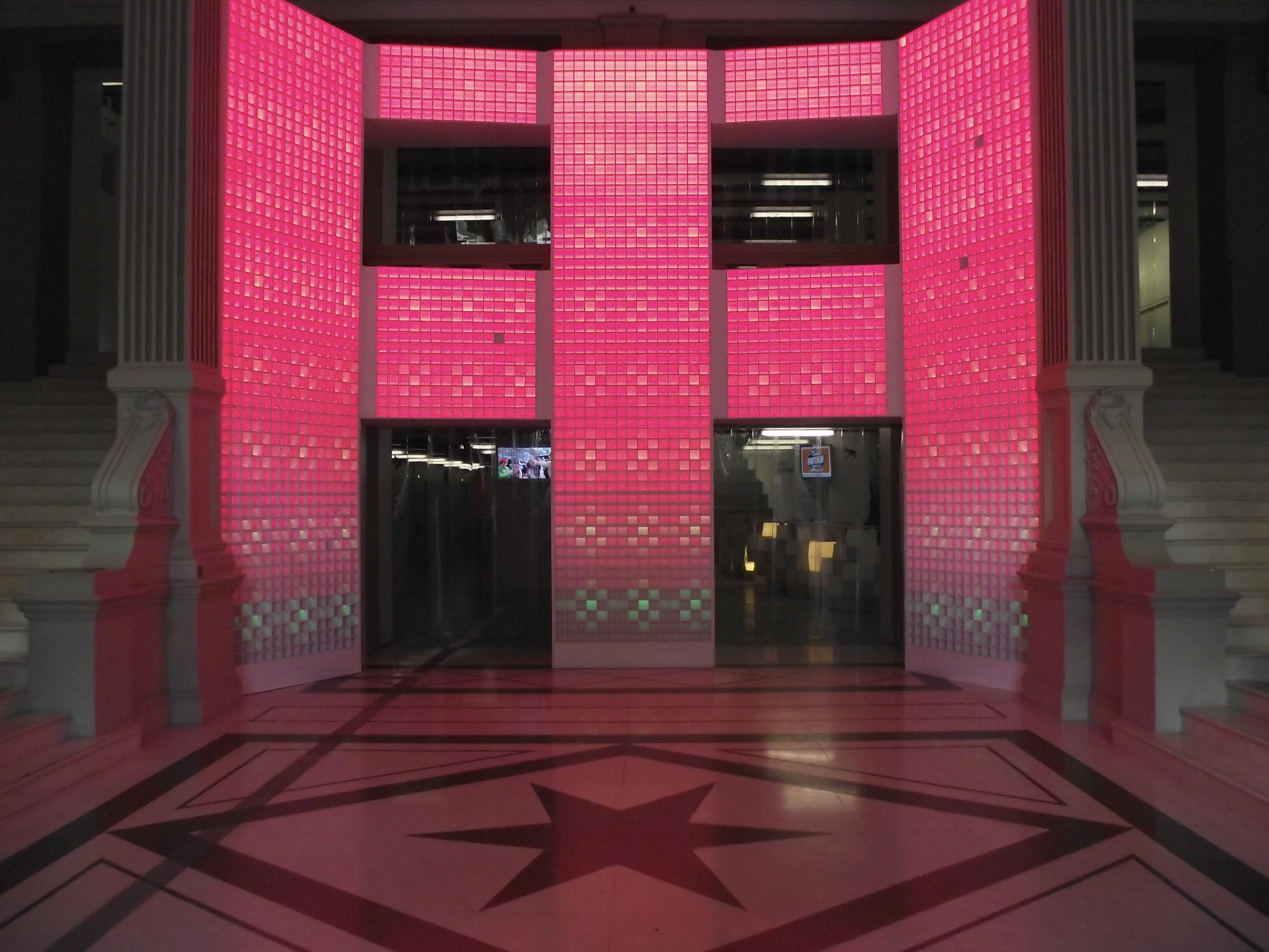 Théâtre de la Gaîté hall d'entrée